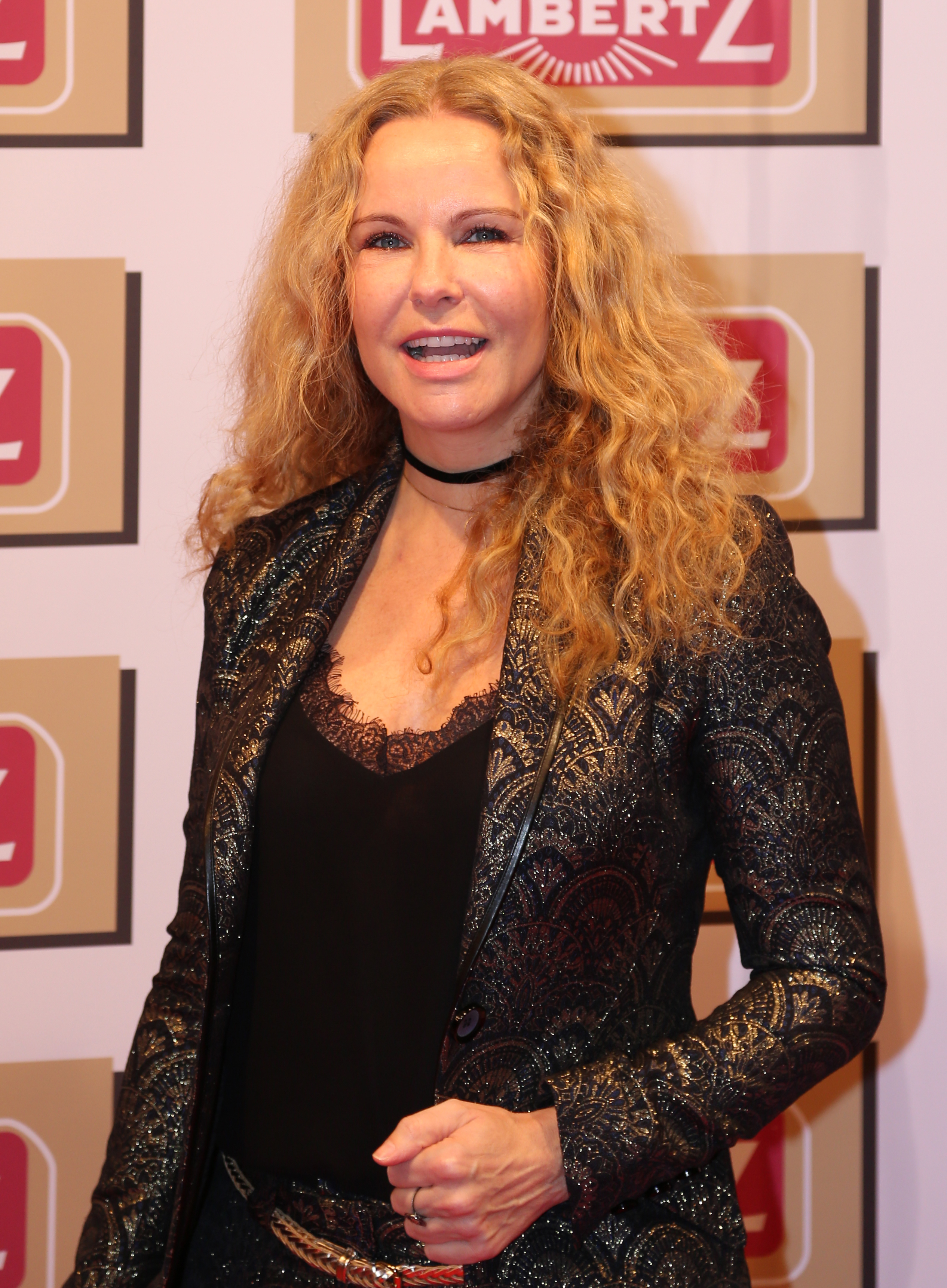 Katja Burkard bei der Lambertz Monday Night 2017.